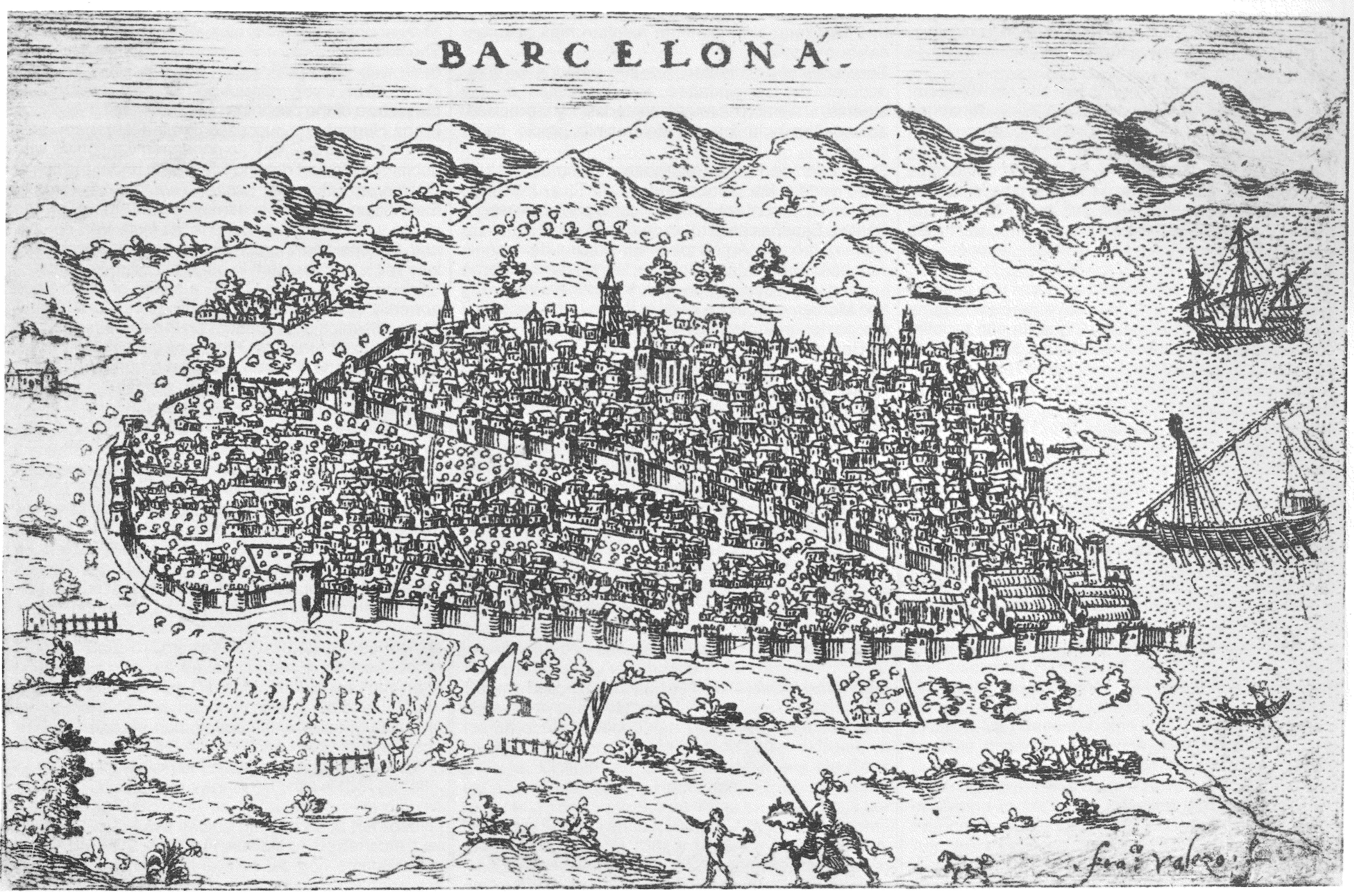 Vista de la ciutat de Barcelona des de Montjuïc, 1579, amb les muralles d'època medieval.